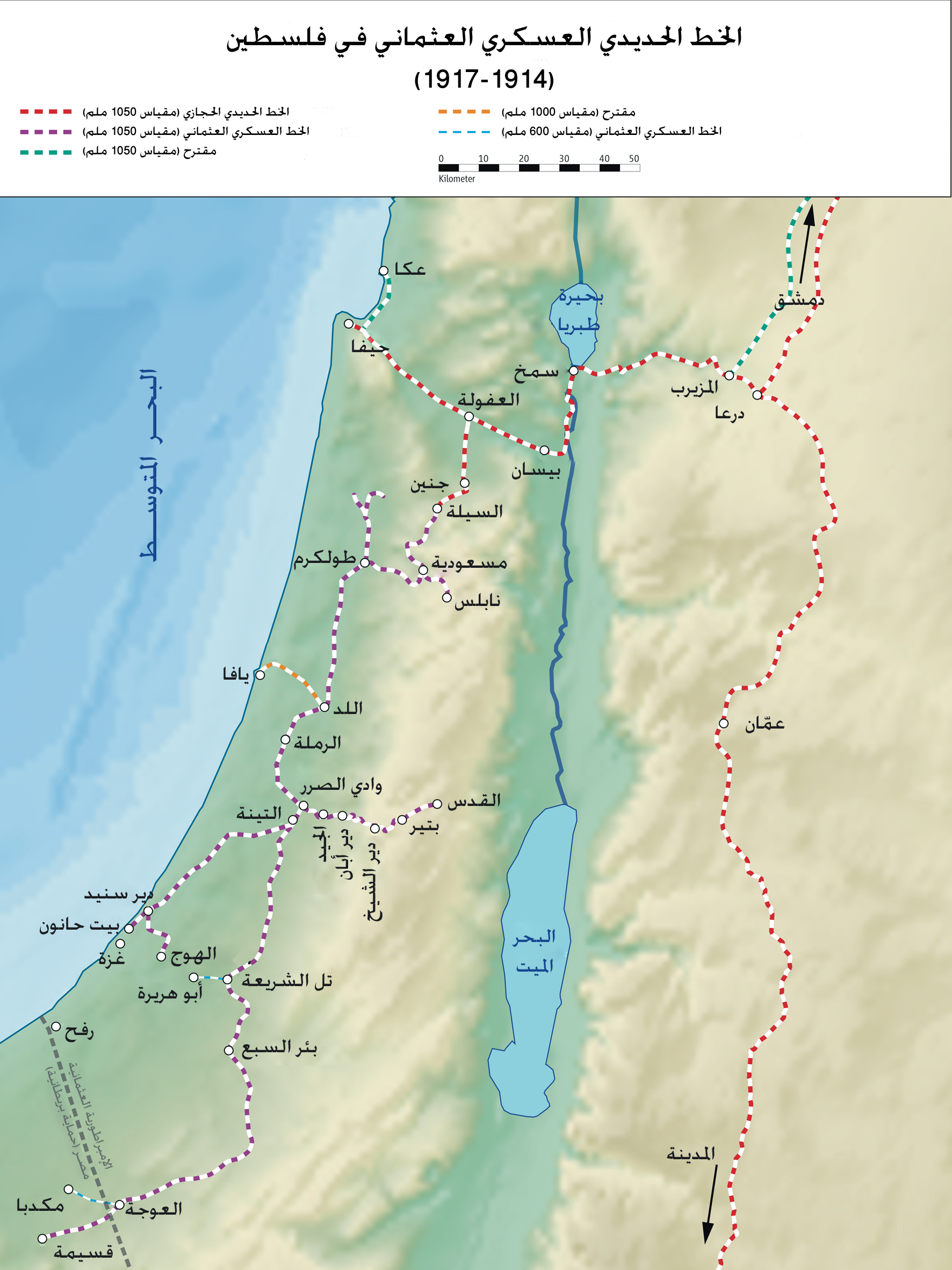 خريطة مسار الخط الحديدي العسكري العثماني في فلسطين 1914-1917.